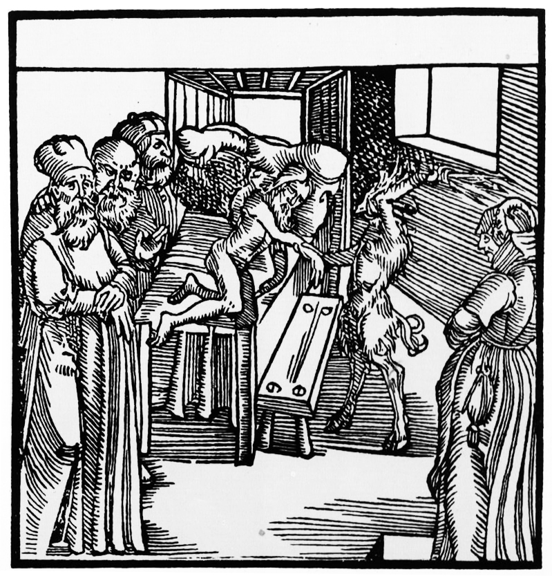 "Хвастанне Іова". Кніга Іова. Прага. 1517. - 87Х86 мм.